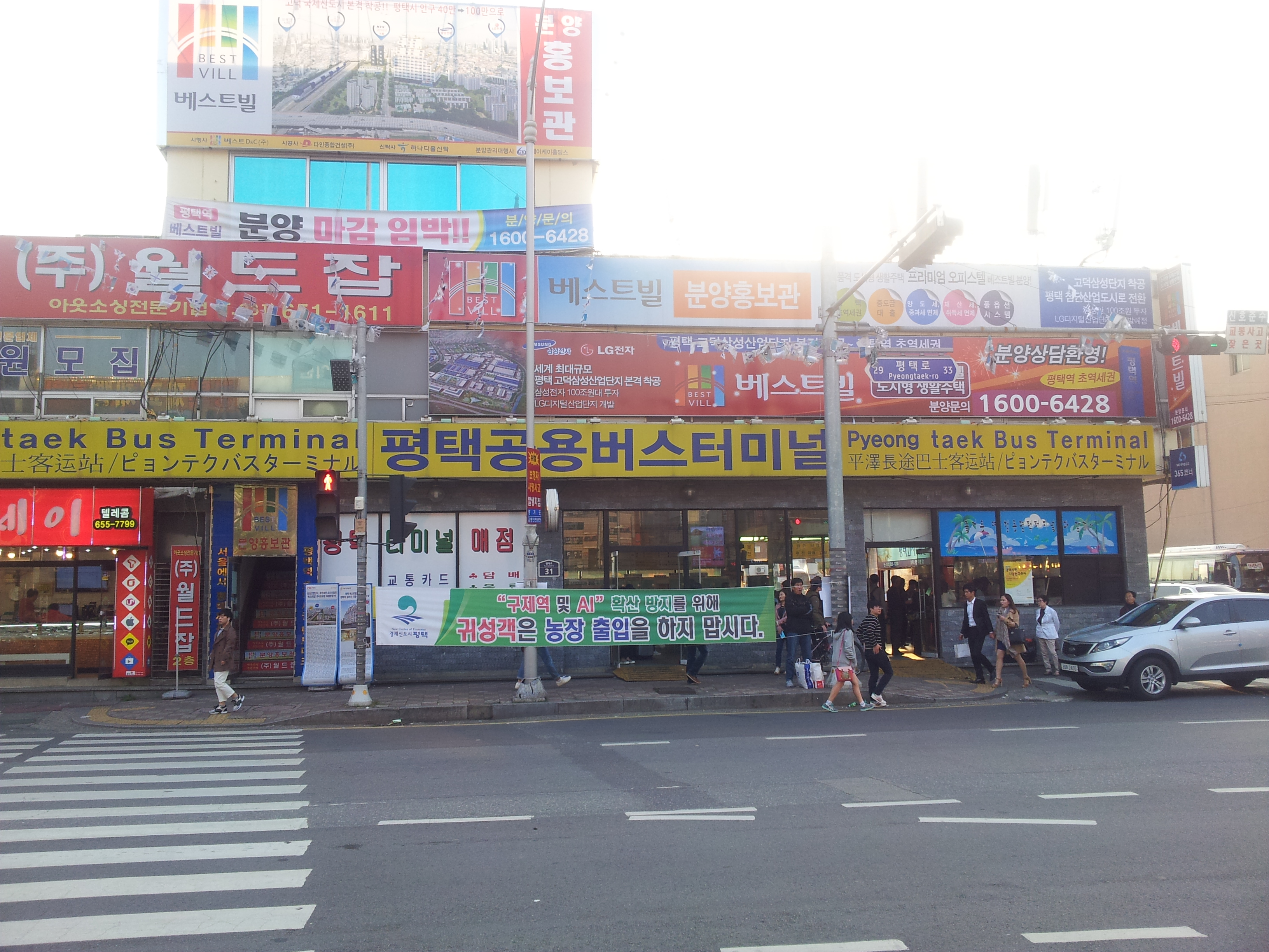 평택시외버스터미널 모습